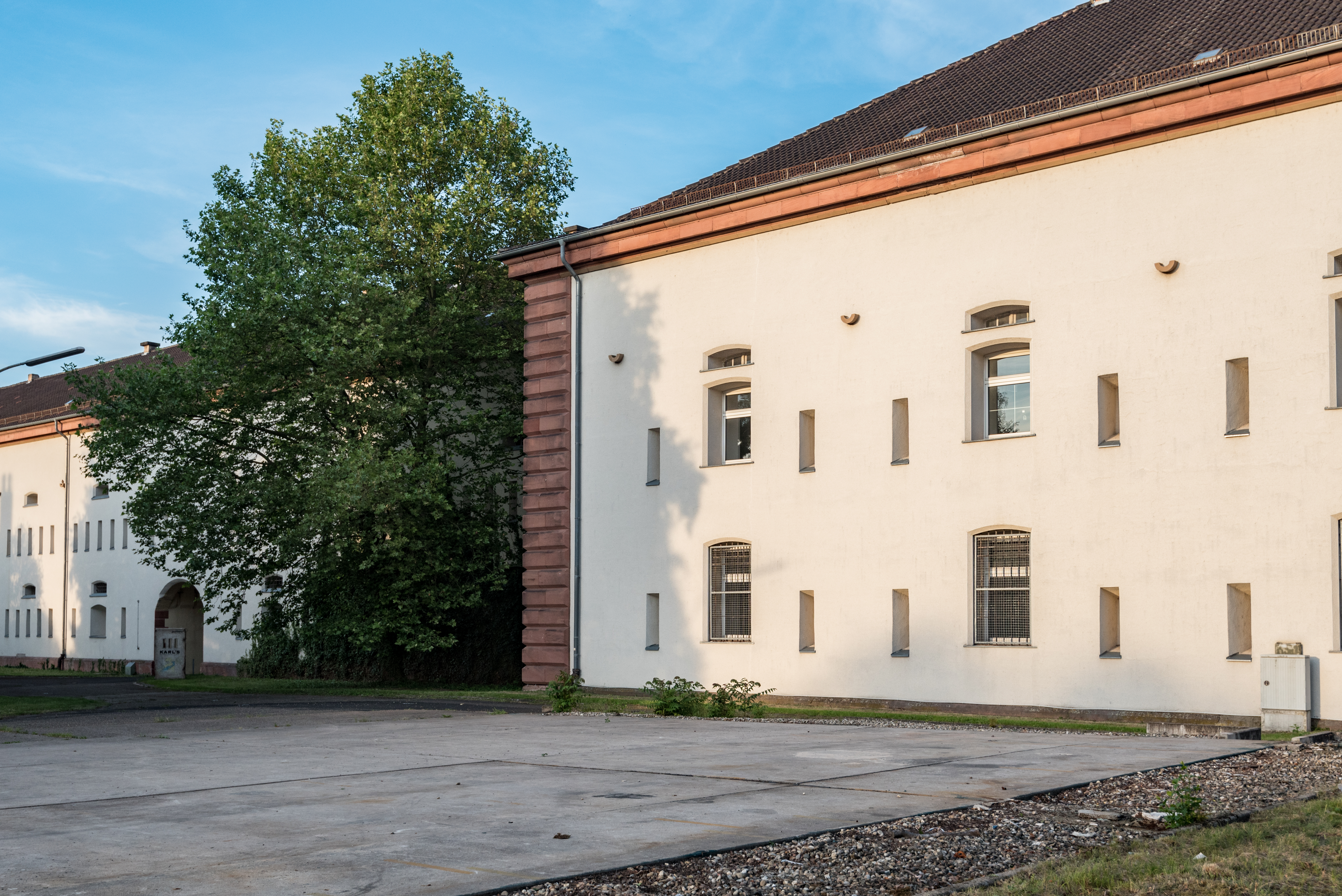 Germersheim, Festung, Stengelkaserne